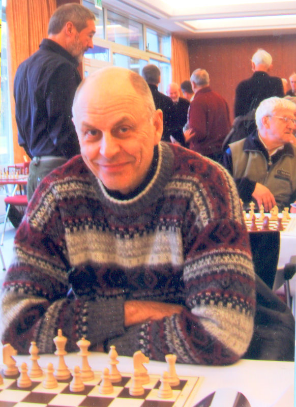 Vytautas Vaitonis Klaipėdos šachmatų klube "Bokštas", 2010 vasario 27 d.